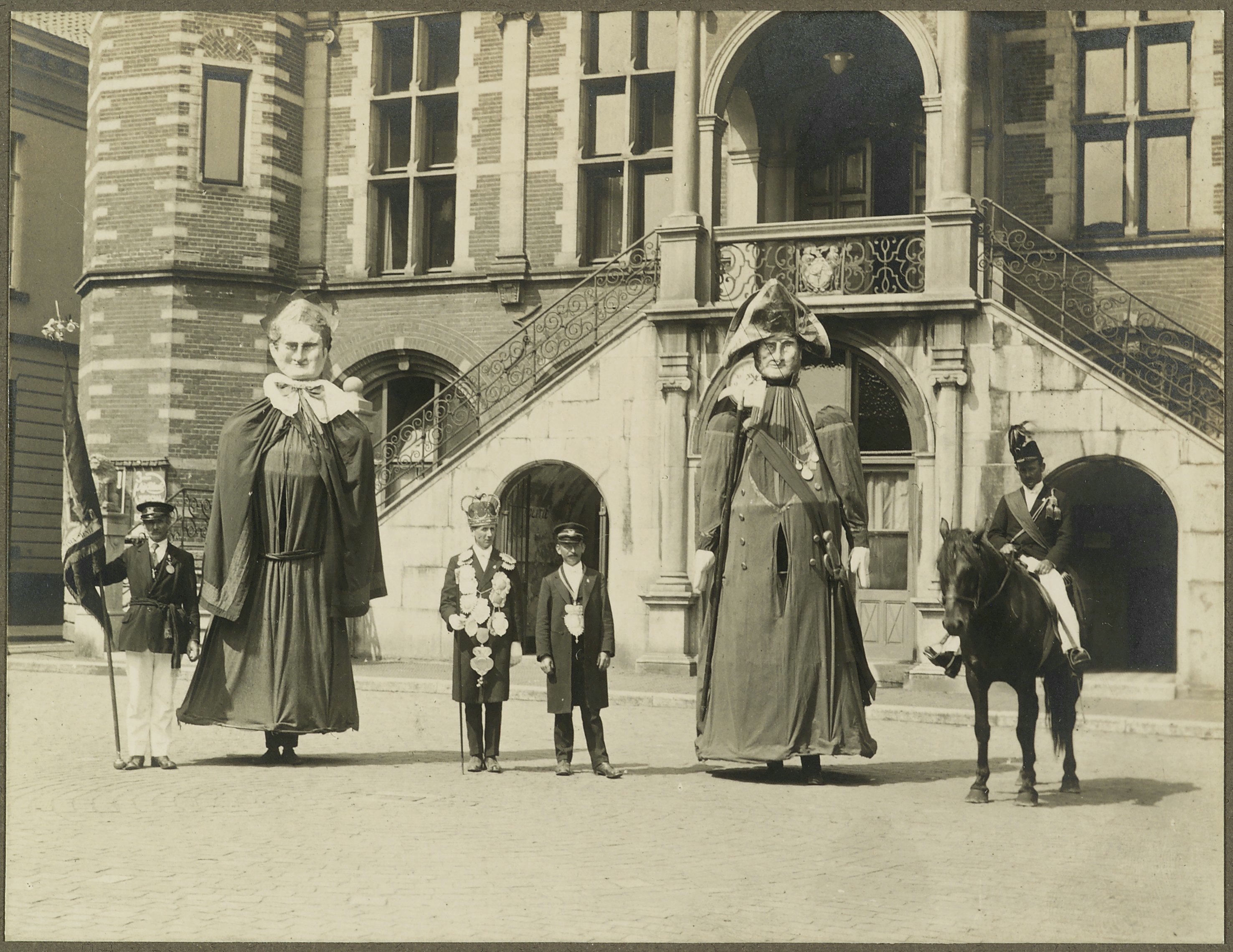 Stichters Van De Stad: Carnavalsfiguren van de legendarische stichters van Venlo (opmerking: Fotograaf te Venlo Kerkstraat)